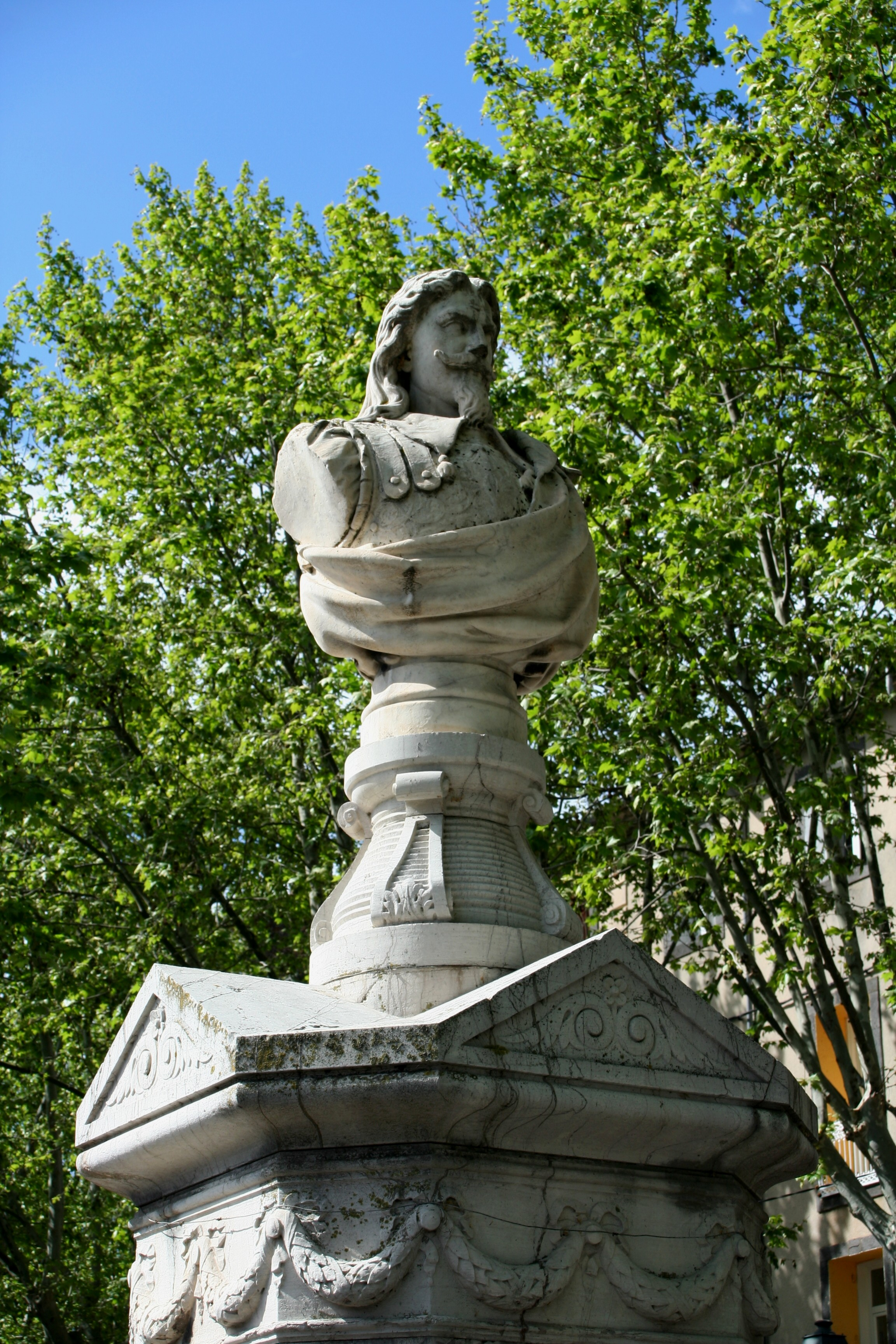 Buste de Claude Terrisse, corsaire du roi, Agde, Hérault